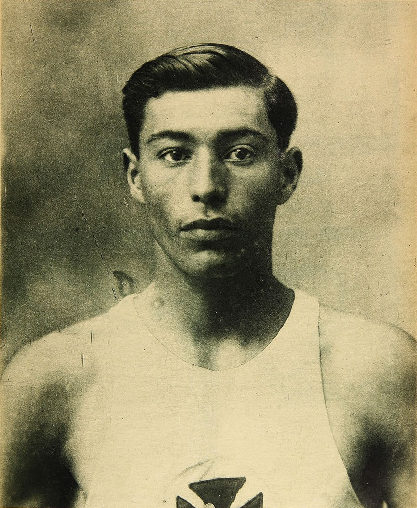 Manuel Plaza, atleta chileno.